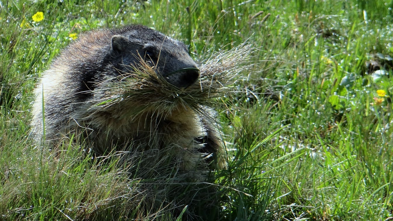 Marmotte renouvelant sa litière